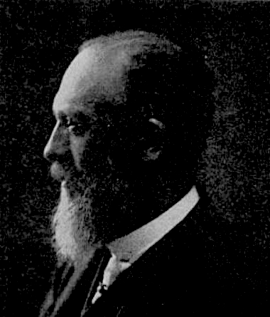 Schickedanz Albert fotója